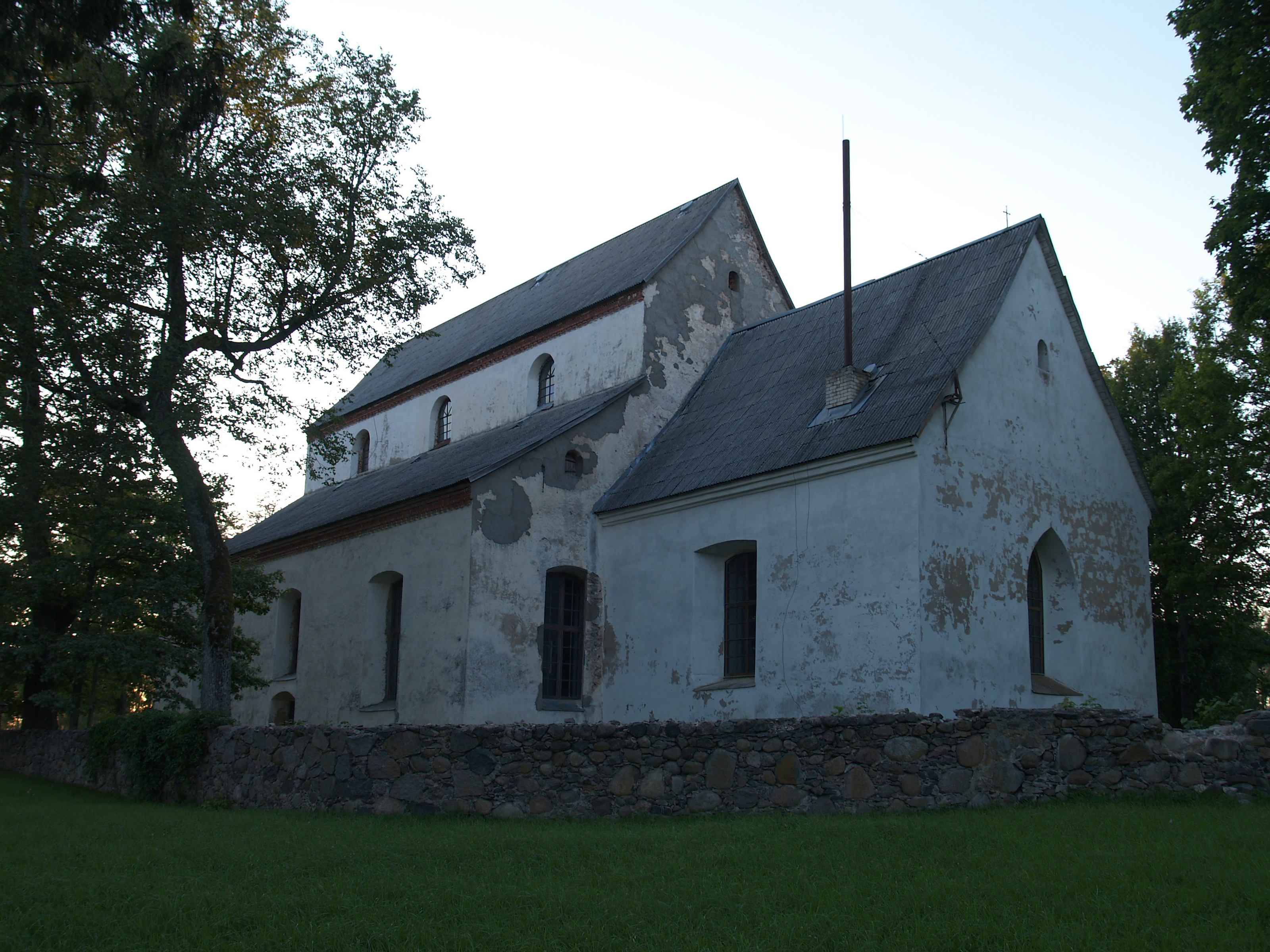 Ruhja luteriusu kirik